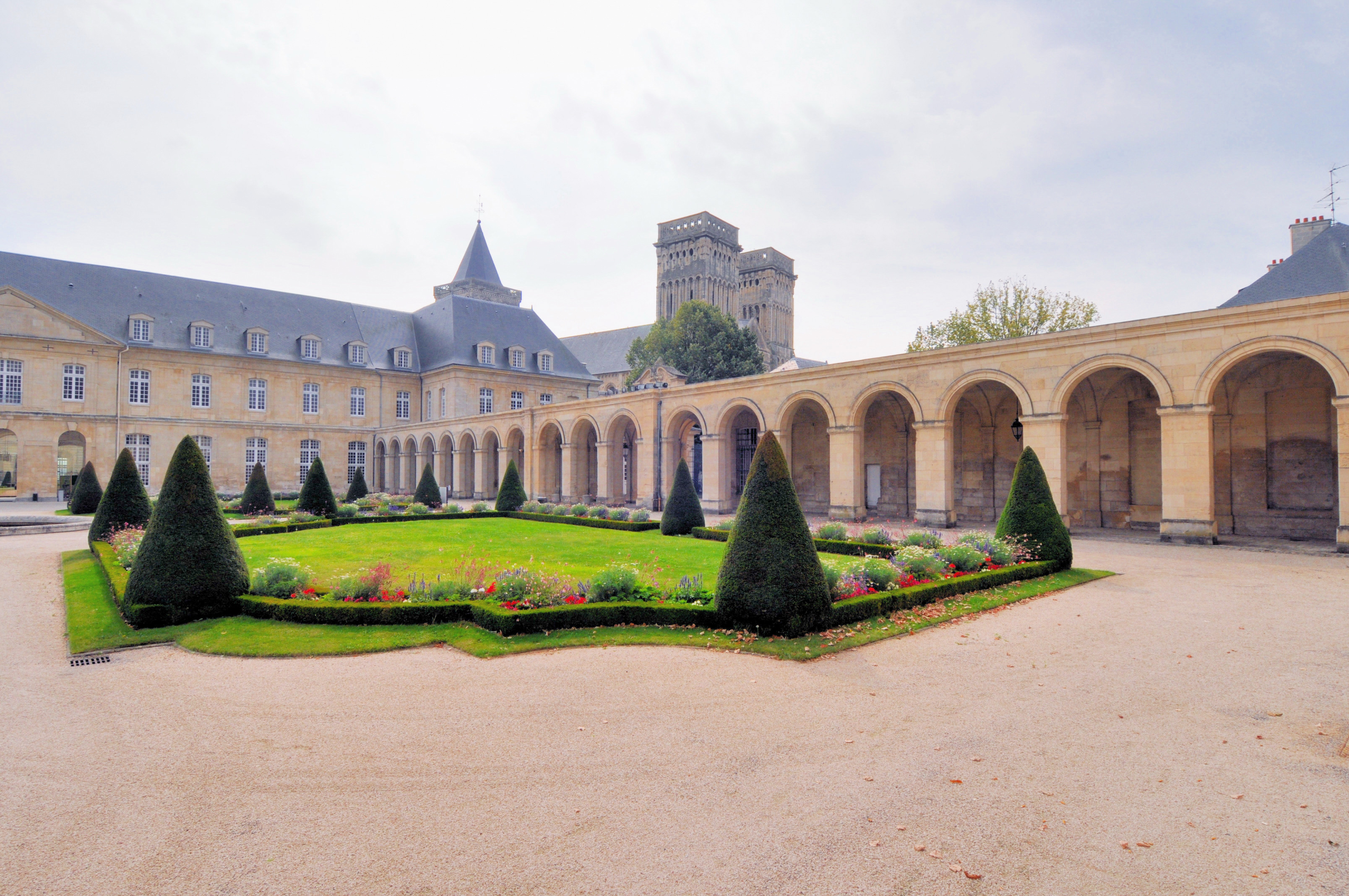 cour d'entrée de l'abbaye aux Dames à Caen (Calvados, Basse-Normandie).